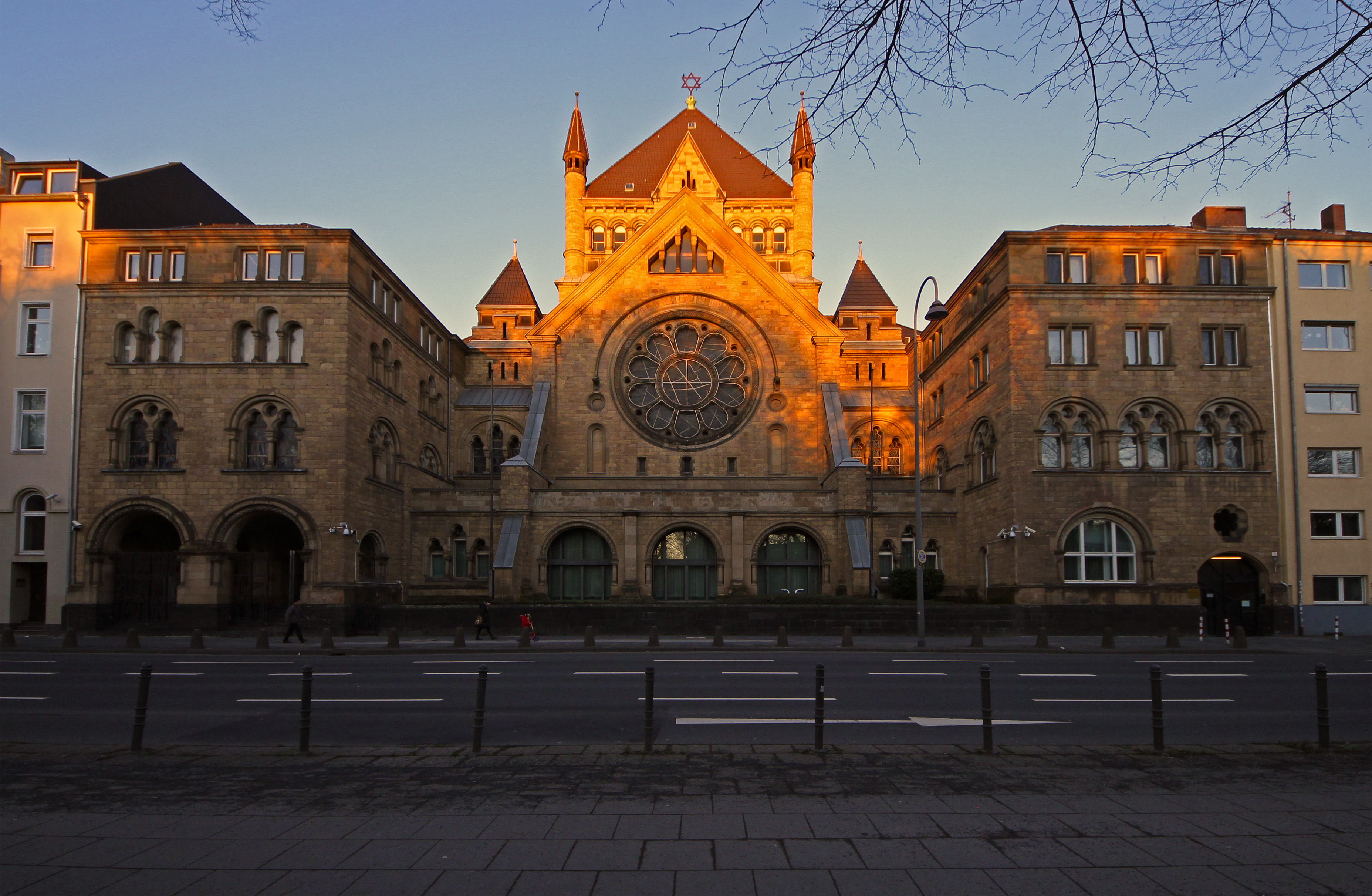 Synagoge Köln an der Roonstraße